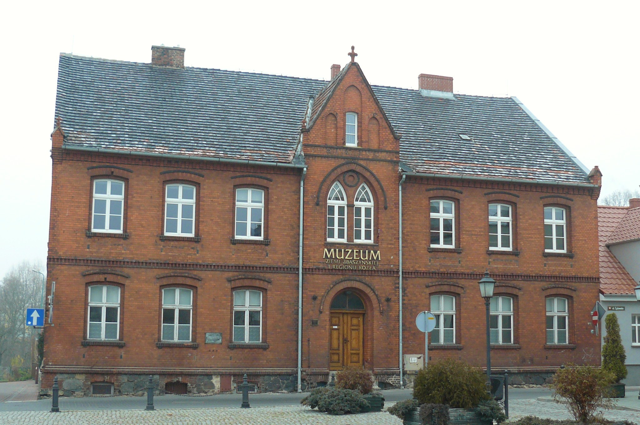 Muzeum Ziemi Zbąszyńskiej i Regionu Kozła, Zbąszyń, Rynek.